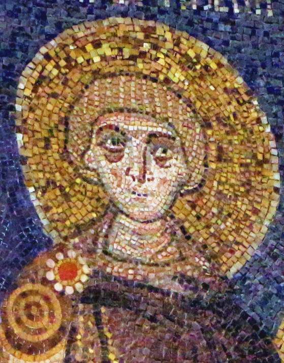 Basilica di Sant'Apollinare in Classe This is a photo of a monument which is part of cultural heritage of Italy.